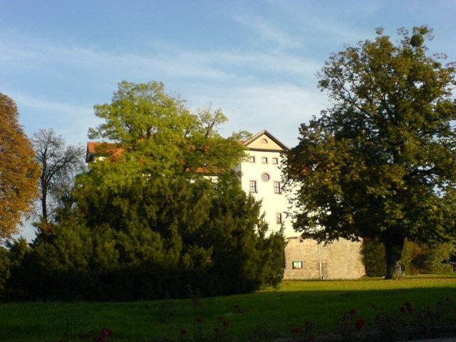 Description=Schloss Bad Frankenhausen Source=myself Date=10.2005 Author=PodracerHH 17:16, 12 September 2007 (UTC)